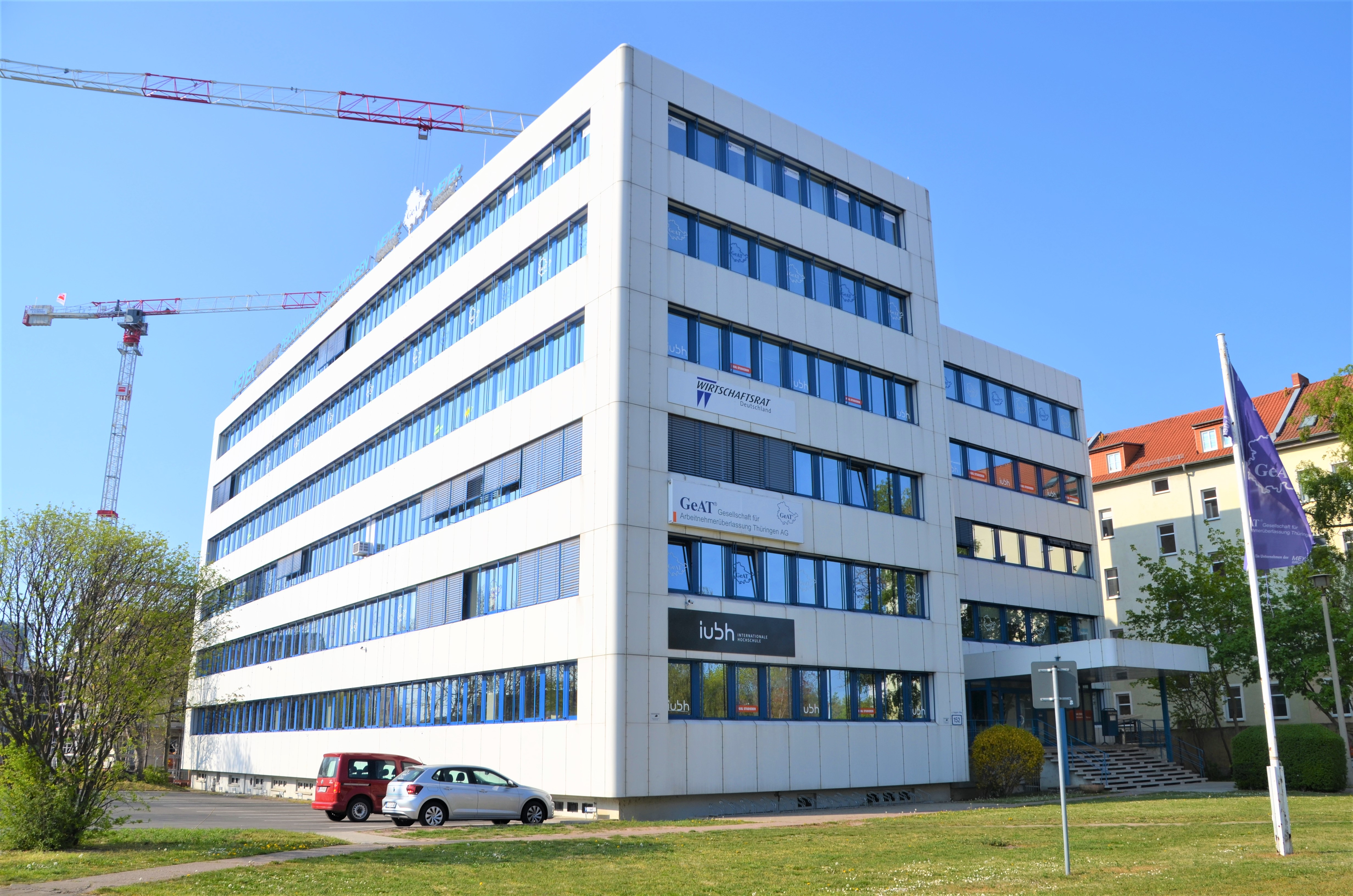 IUBH Erfurt am Juri-Garain-Ring